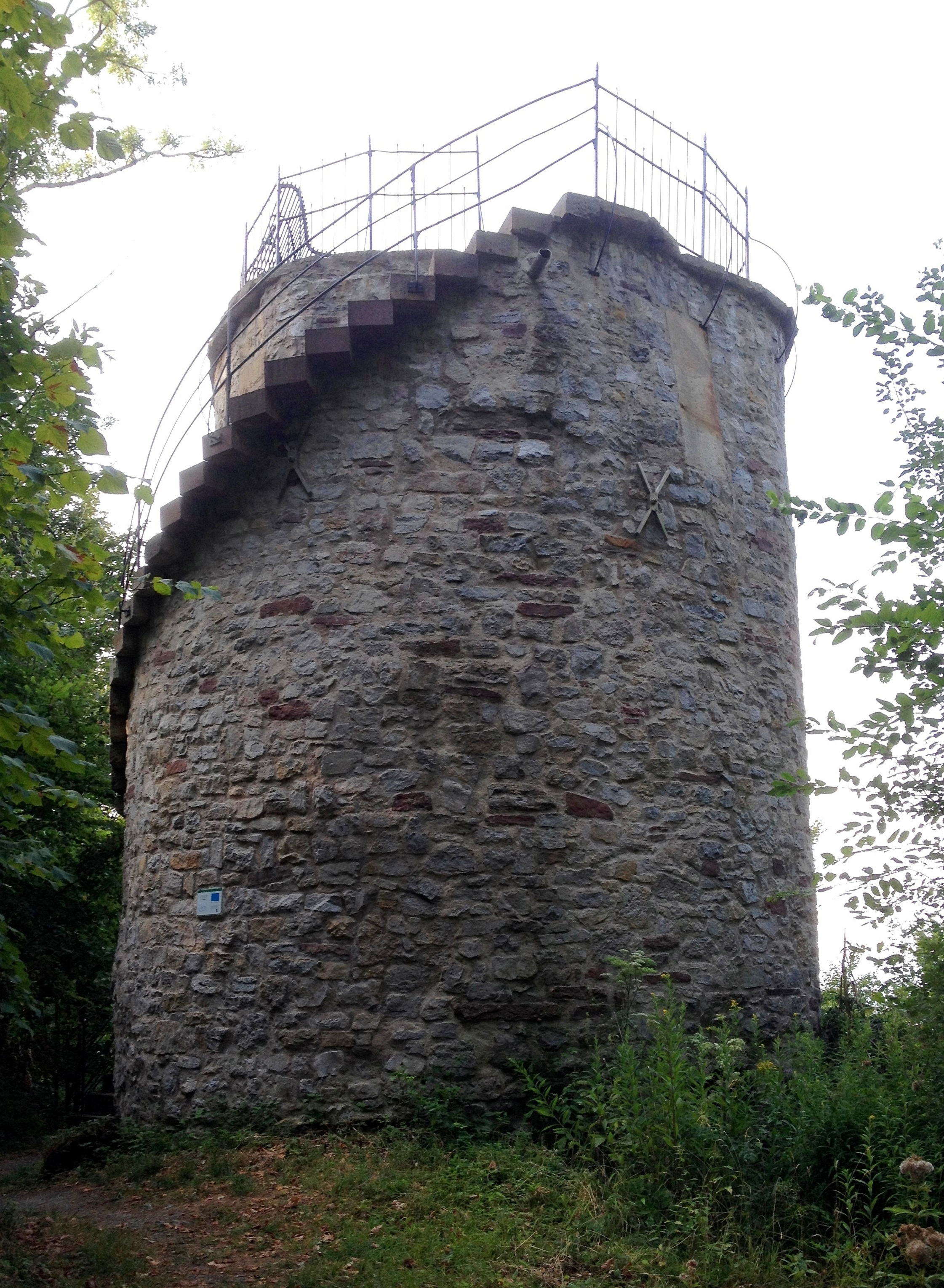 Bad Pyrmont, Schellenturm